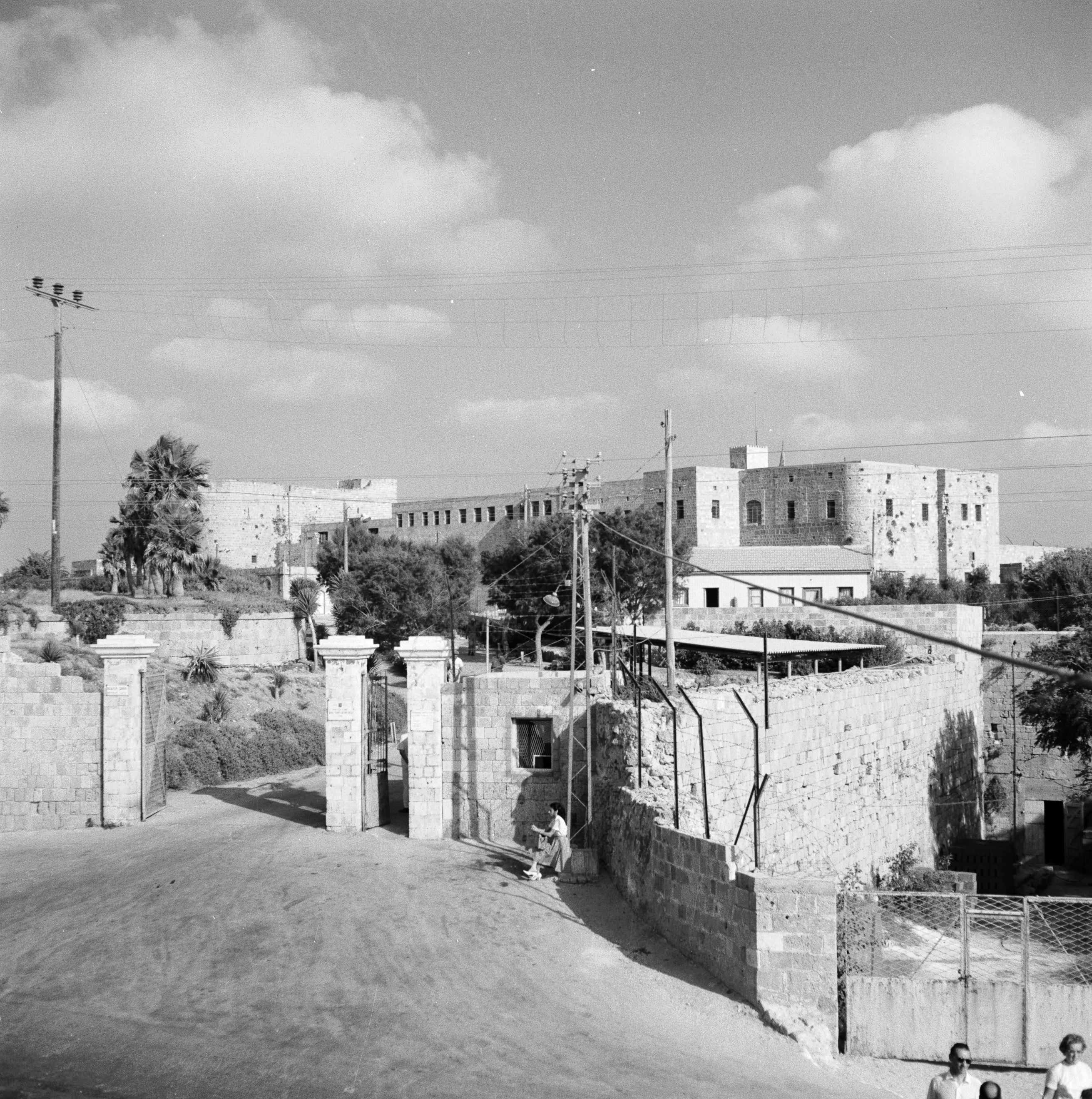 Toegang tot de Citadel-gevangenis. Een citadel is een (vaak stervormige) versterking die een vestingstad domineert en zelfstandig verdedigbaar maakt. Toen de Britten Akko veroverden brachten ze verschillende veranderingen aan in het gebouw. Ze maakten van het hele gebouw de centrale gevangenis van Palestina. Na de oprichting van de staat Israël werd de gevangenis een psychiatrisch ziekenhuis. / Serie: Israël 1964-1965: Akko (Acre), Citadel-gevangenis